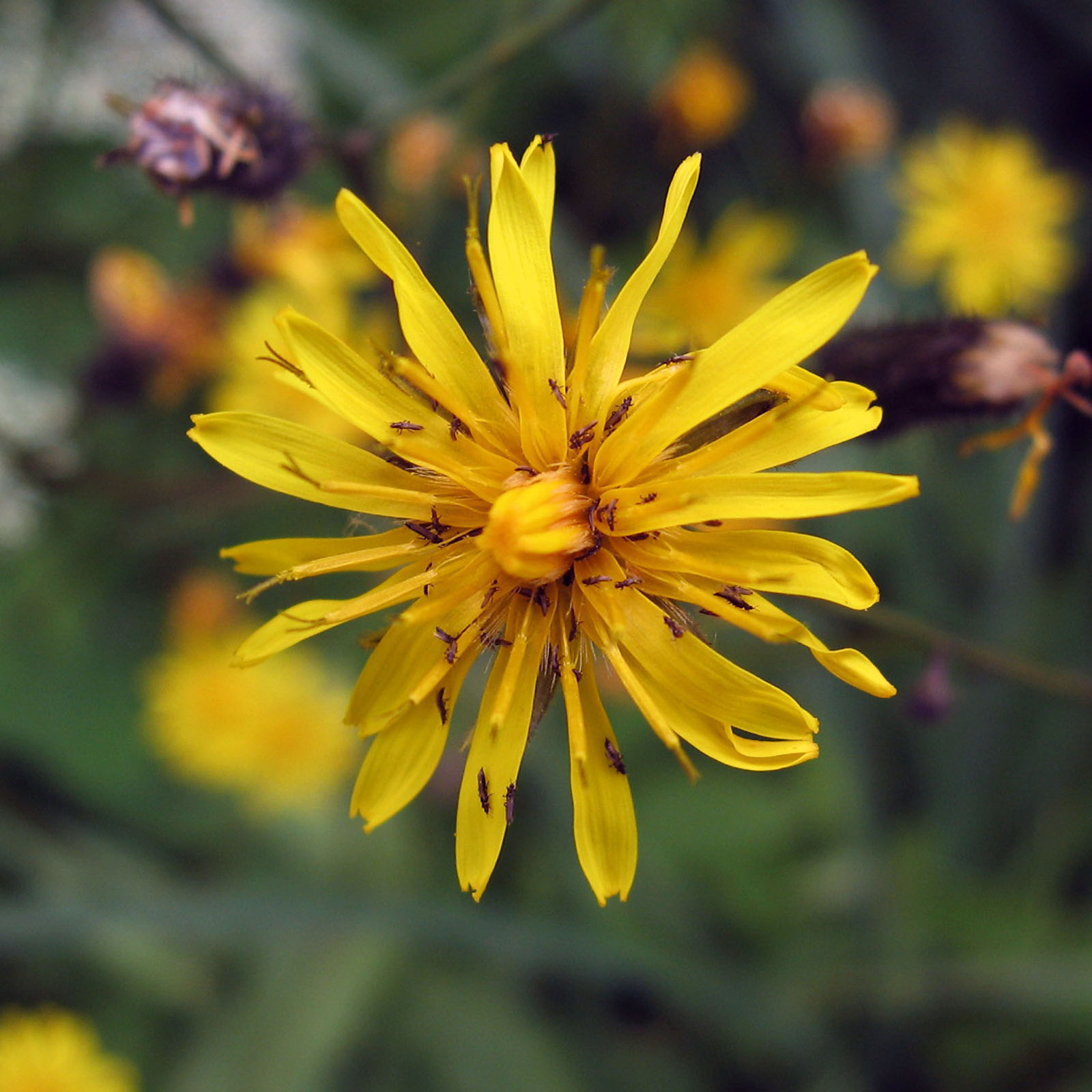 Liiv-koeratubakas Lld: Crepis tectorum